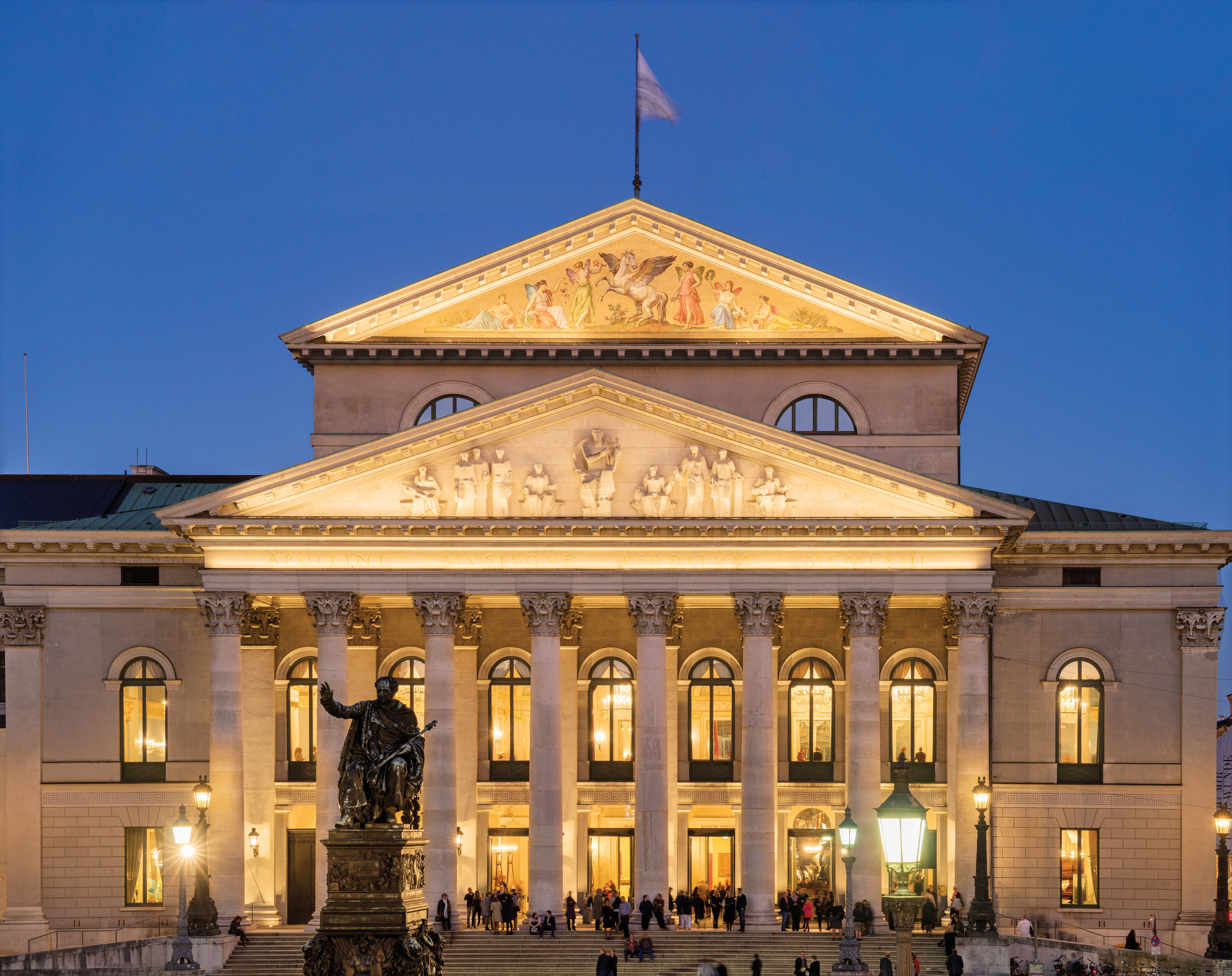 Ersetzung der zweckdienlichen Beleuchtung der acht Säulen, derPilaster sowie des unteren und oberen Tympanons der Fassade des Nationaltheaters München durch eine neue LED-Fassadebeleuchtung.